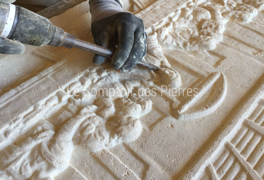 Gravure sur pierre de Bourgogne - La cène - Atelier Le Comptoir des Pierres